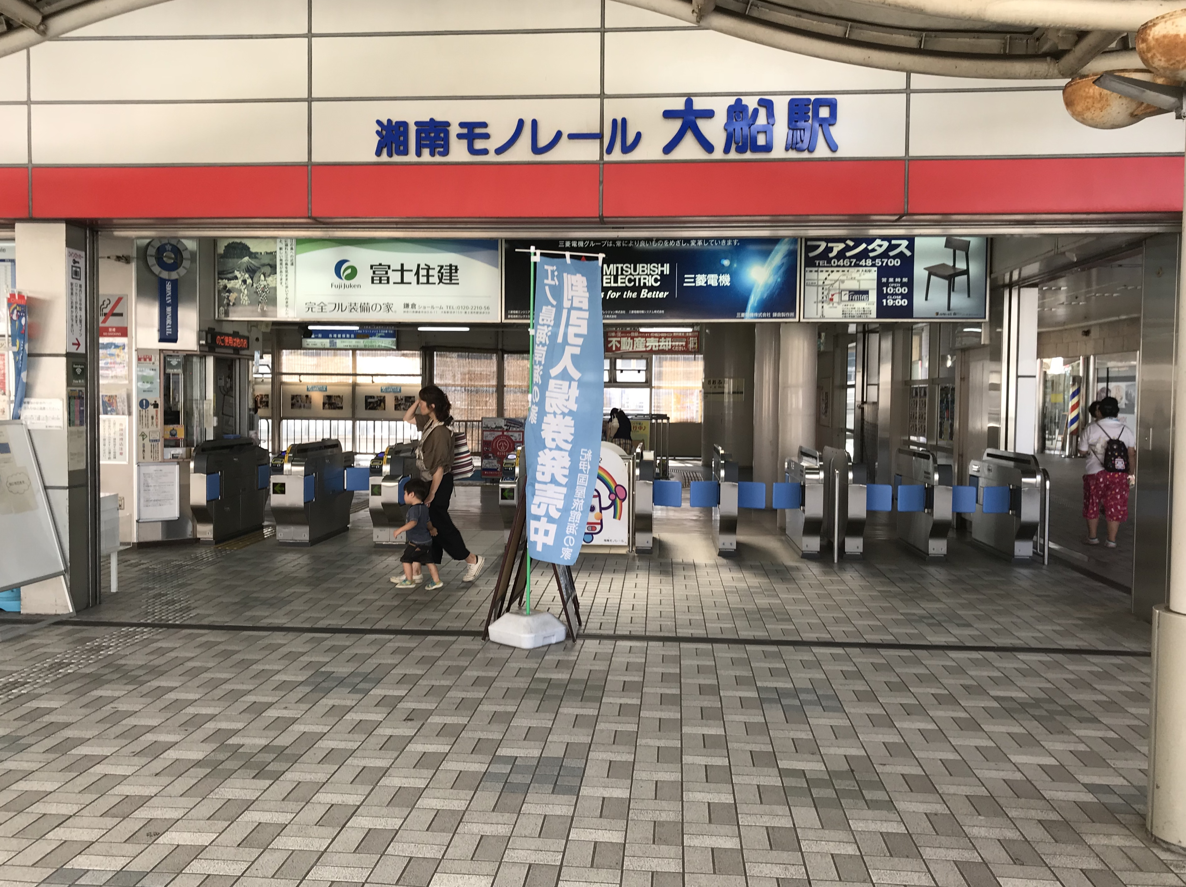 湘南モノレール大船駅改札口